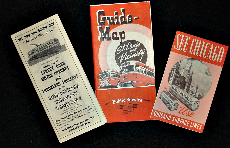 Zelfgefotografeerde media